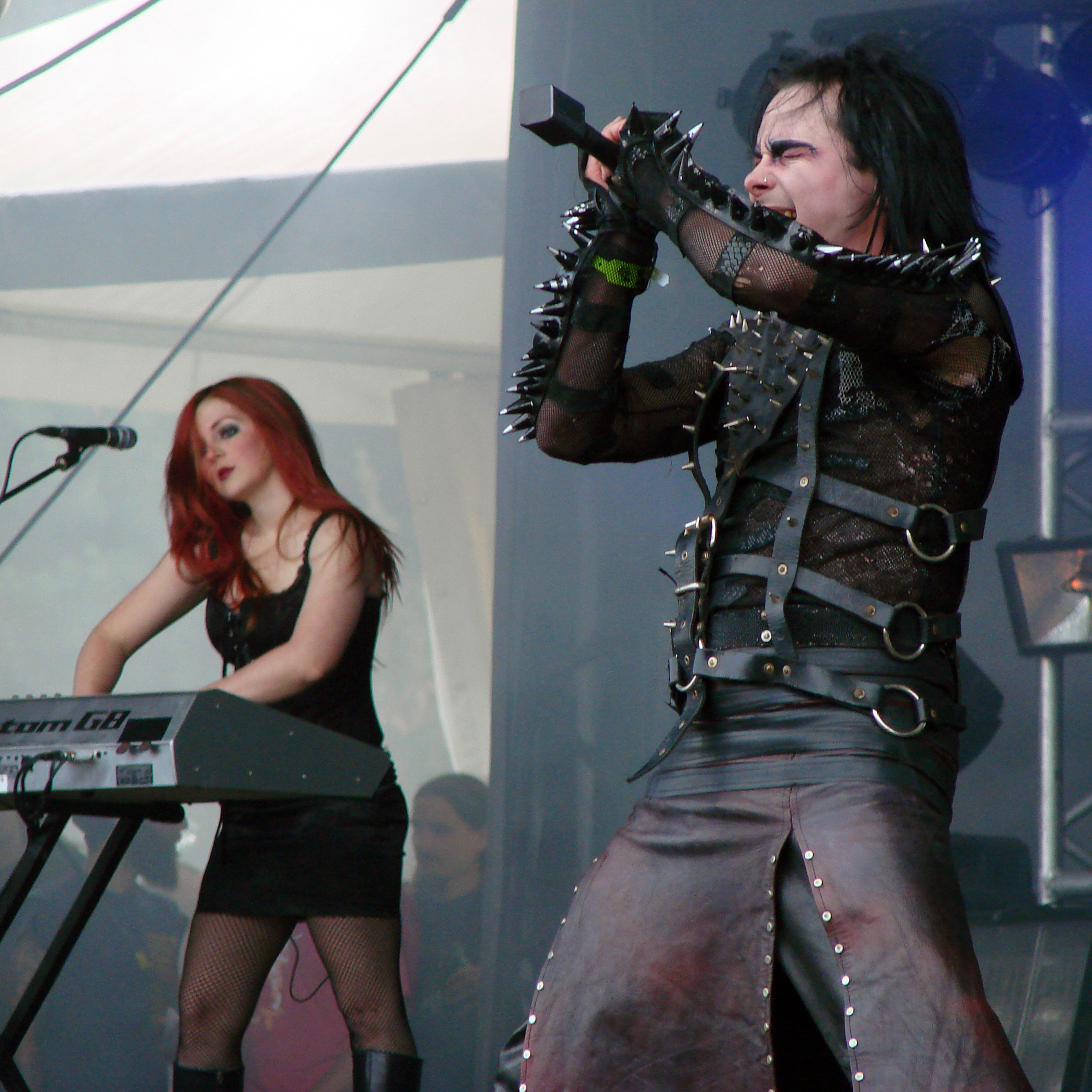 Cradle of Filth au Hellfest 2009.